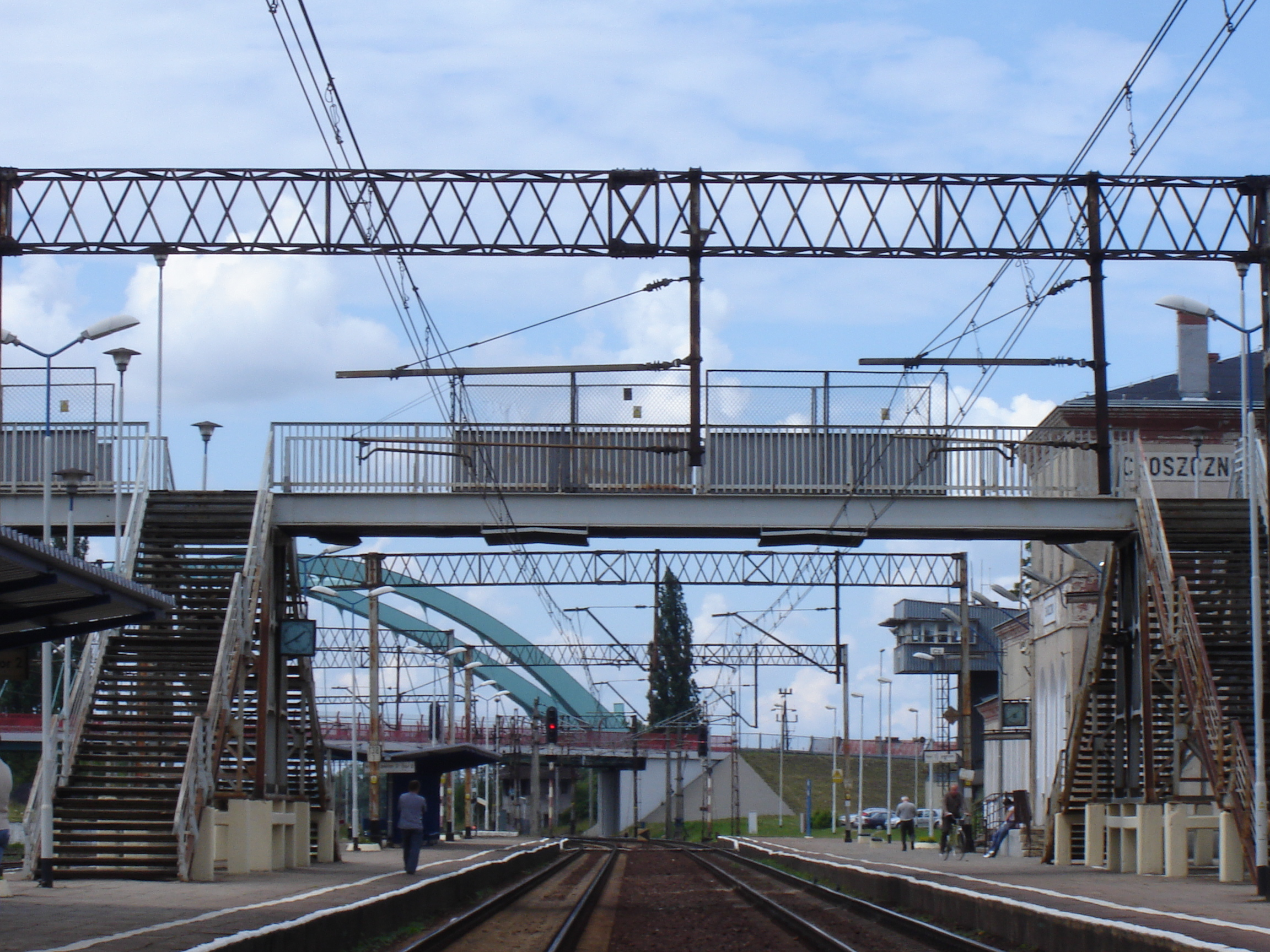 Widok na stację kolejową w Choszcznie.